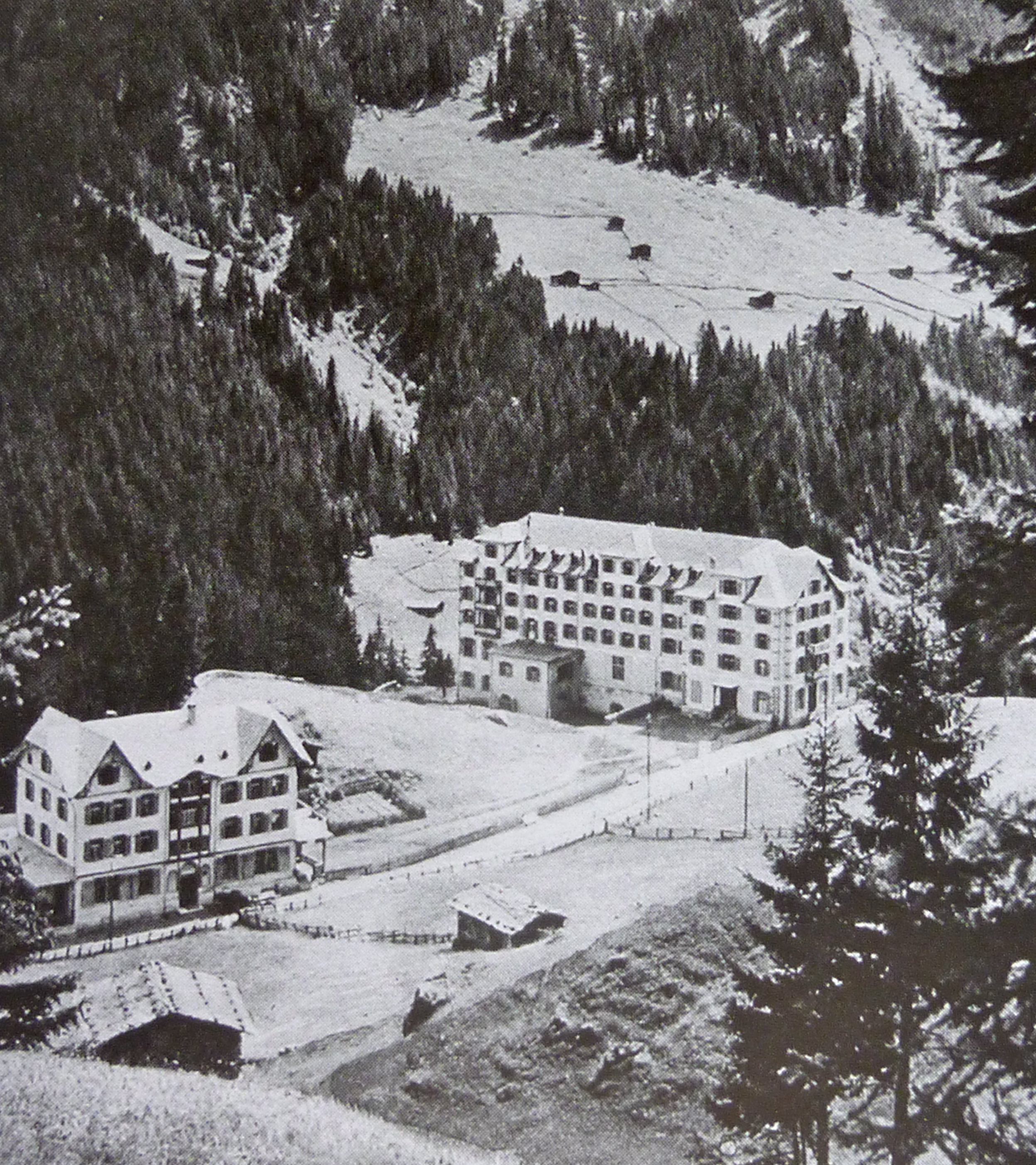 Hotel Tenigerbad im Val Sumvitg um 1914